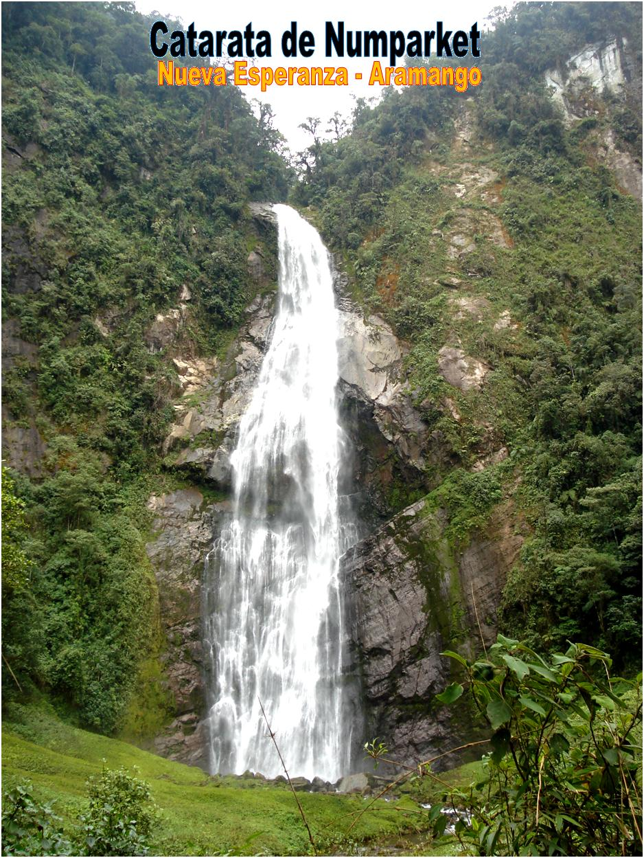 Cataratas de la amazonia